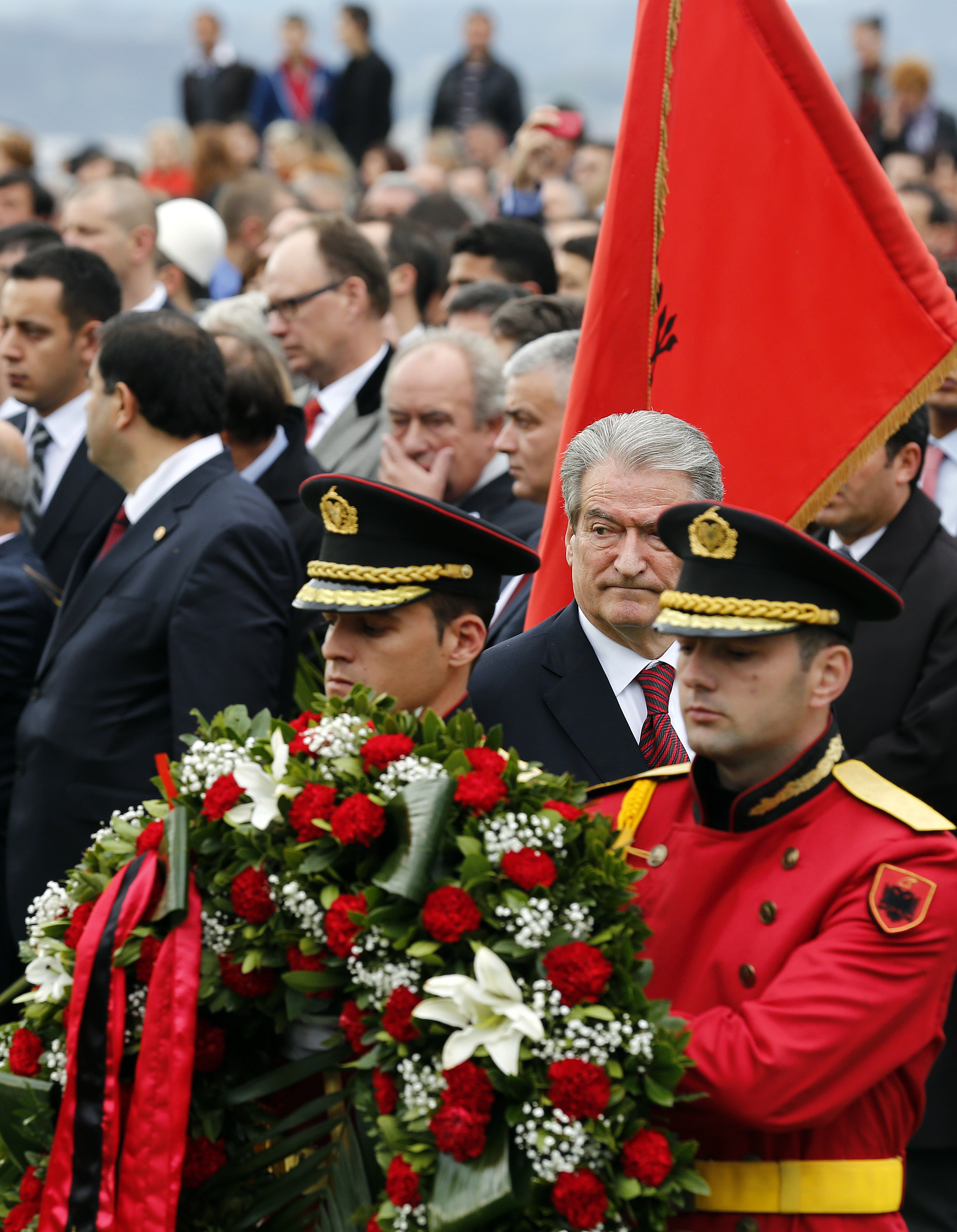 Feierlichkeiten im Rahmen der 100-jährigen Unabhängigkeit von Albanien, Sali Berisha, Tirana, Albanien, 28.11.2012, Foto: Dragan Tatic